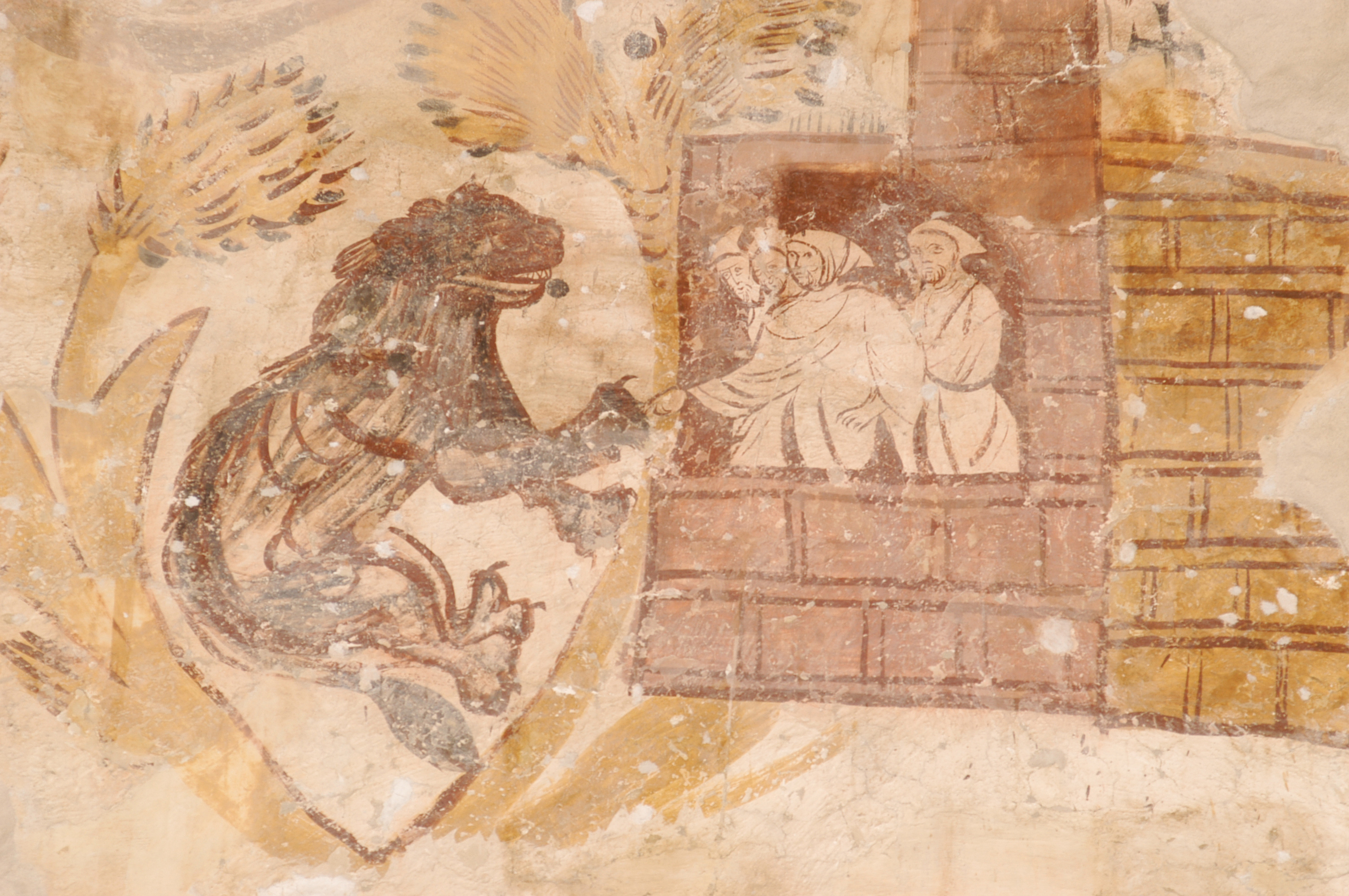 Chiesa di San Bevignate This is a photo of a monument which is part of cultural heritage of Italy.